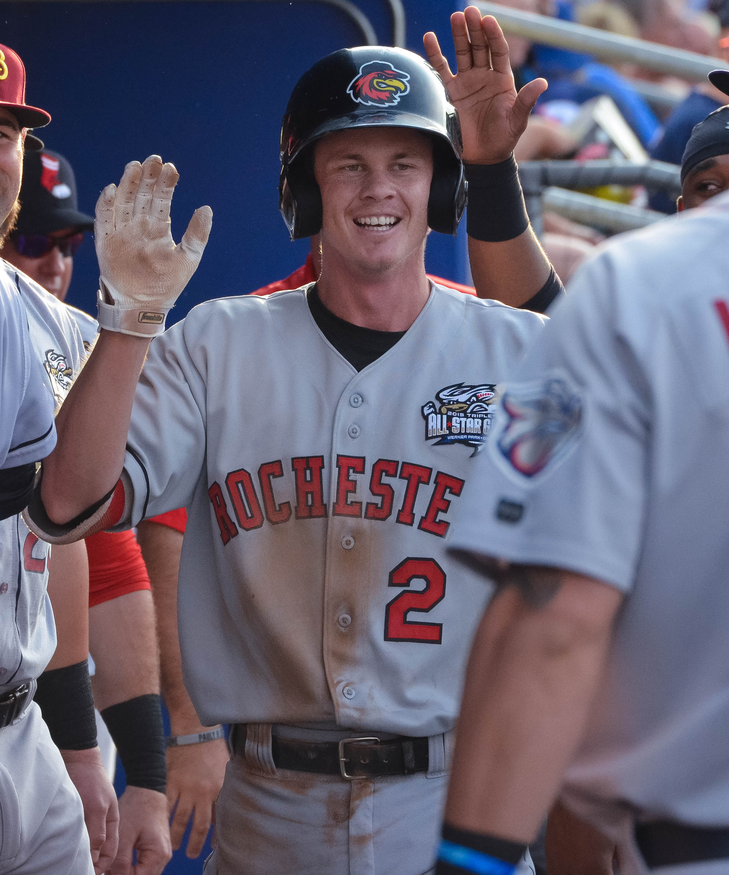 James Beresford